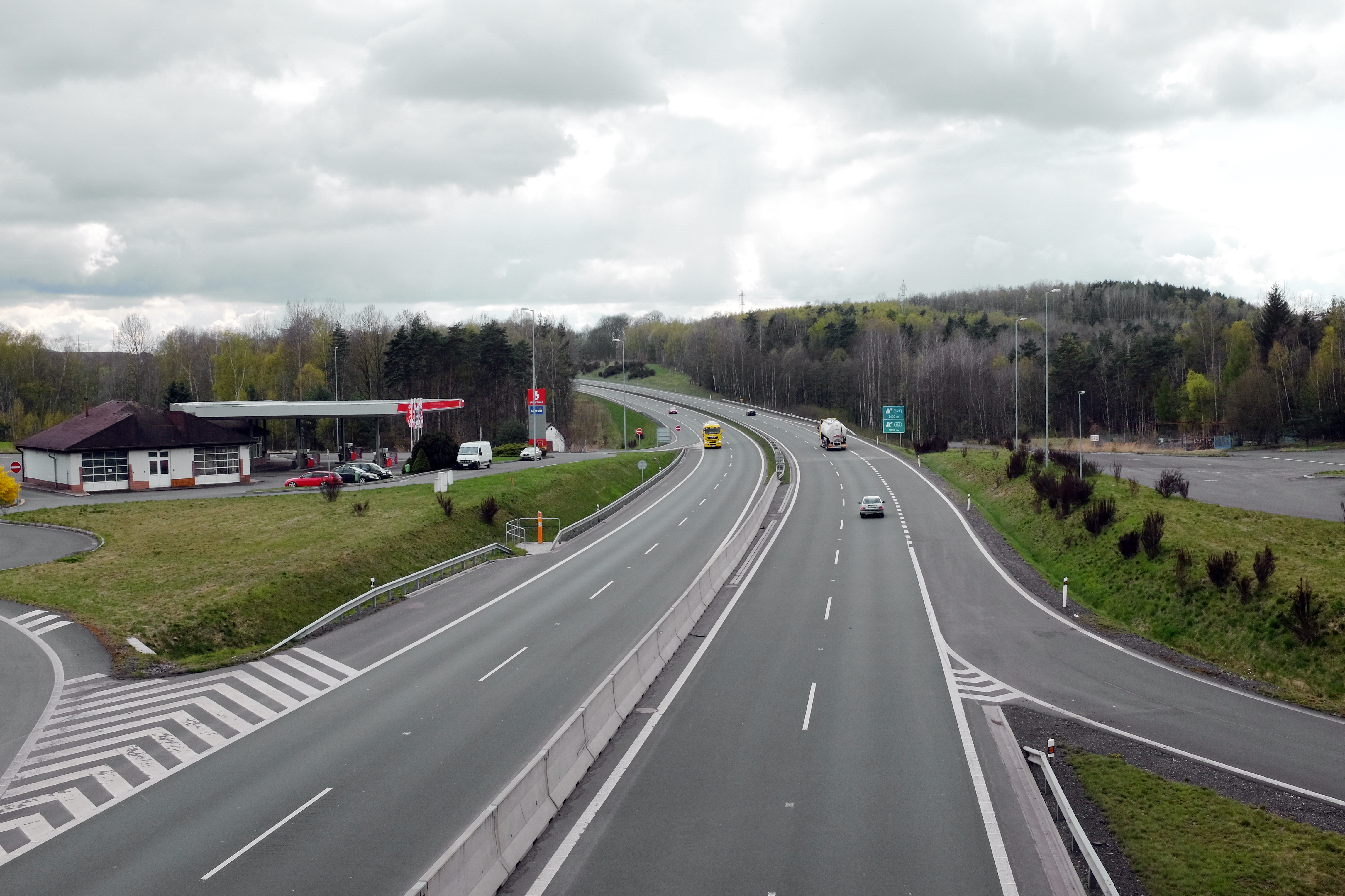 Dálnice D6 u Sokolova